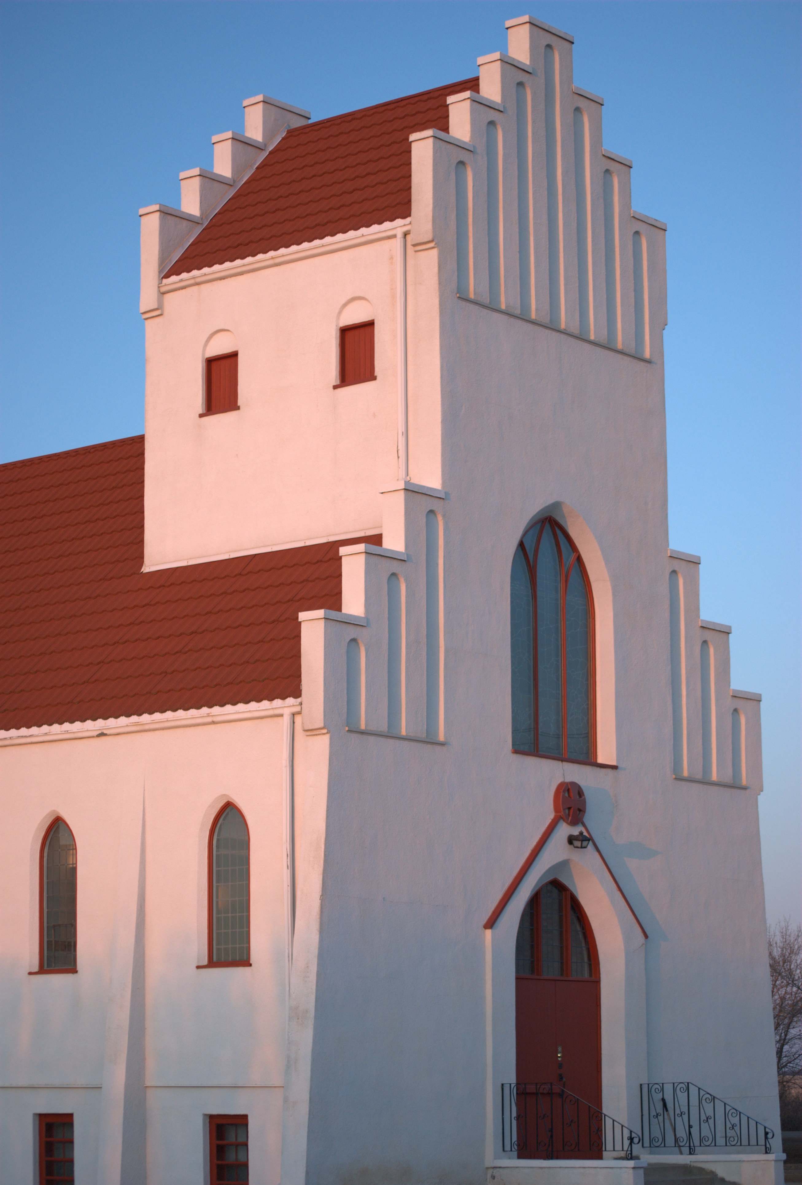 Church at Dalum, Alberta